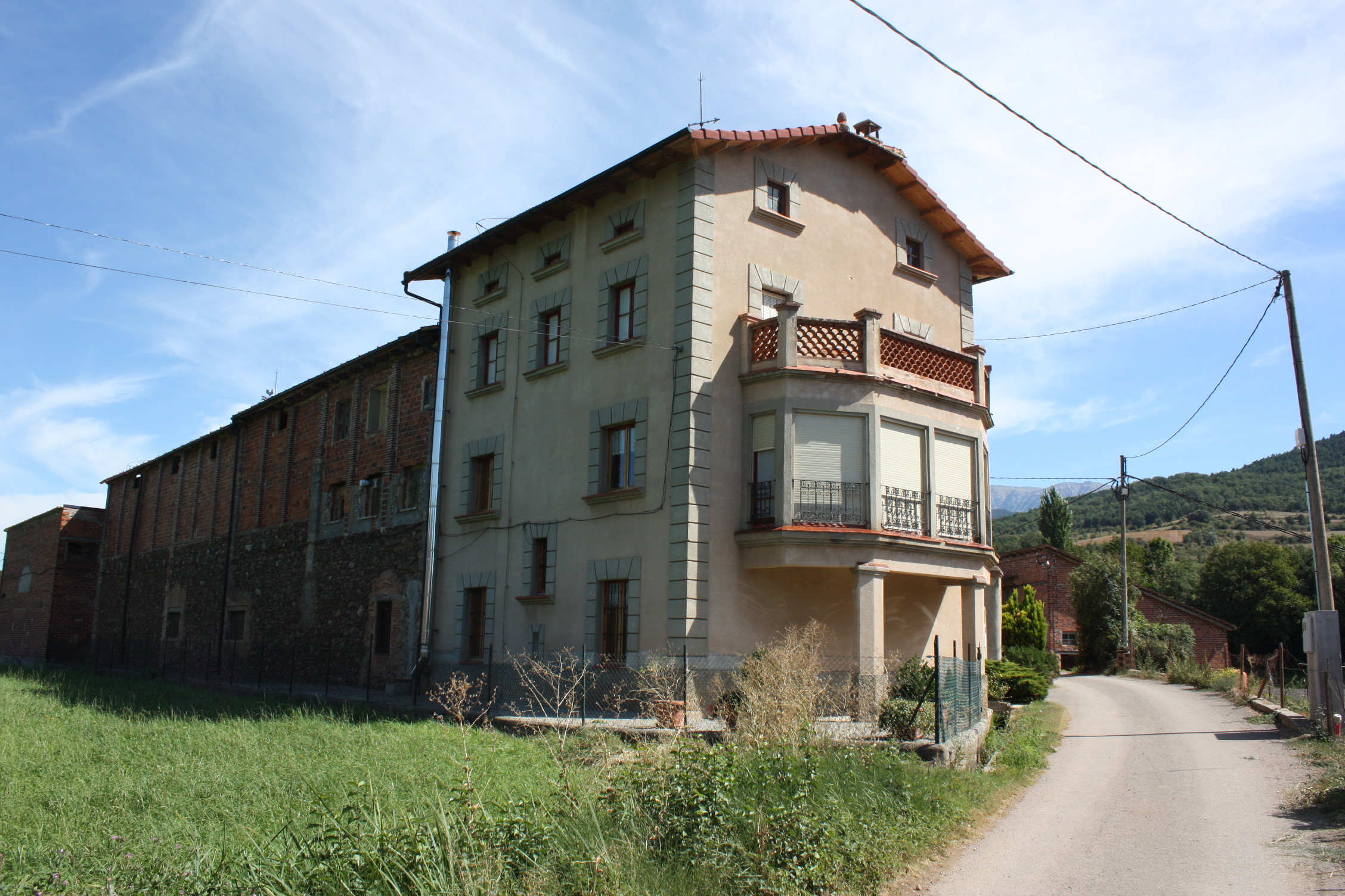 Borda de Cal Cinca, a la partida de Sardina de la Seu d'Urgell.